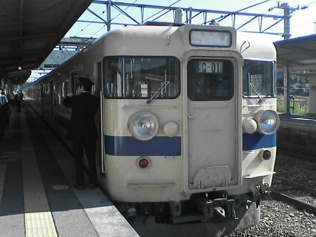 広島地区最後の「デカ目」瀬戸内色。投稿者自身が撮影。